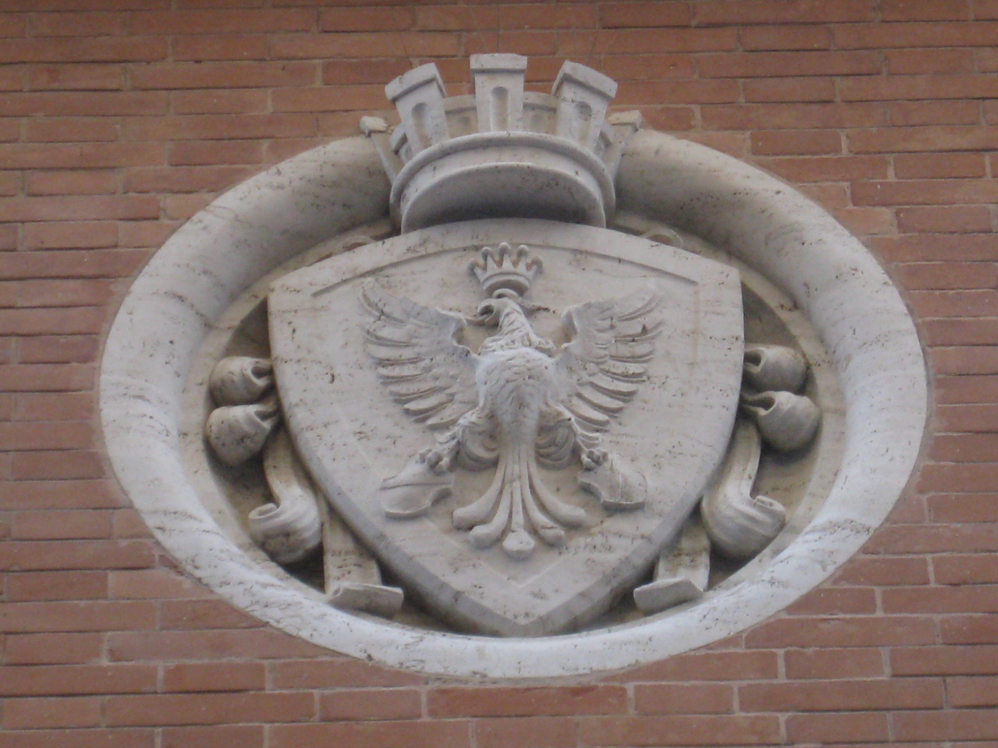 Stemma di Forlì tratto dal Palazzo delle Poste, foto propria